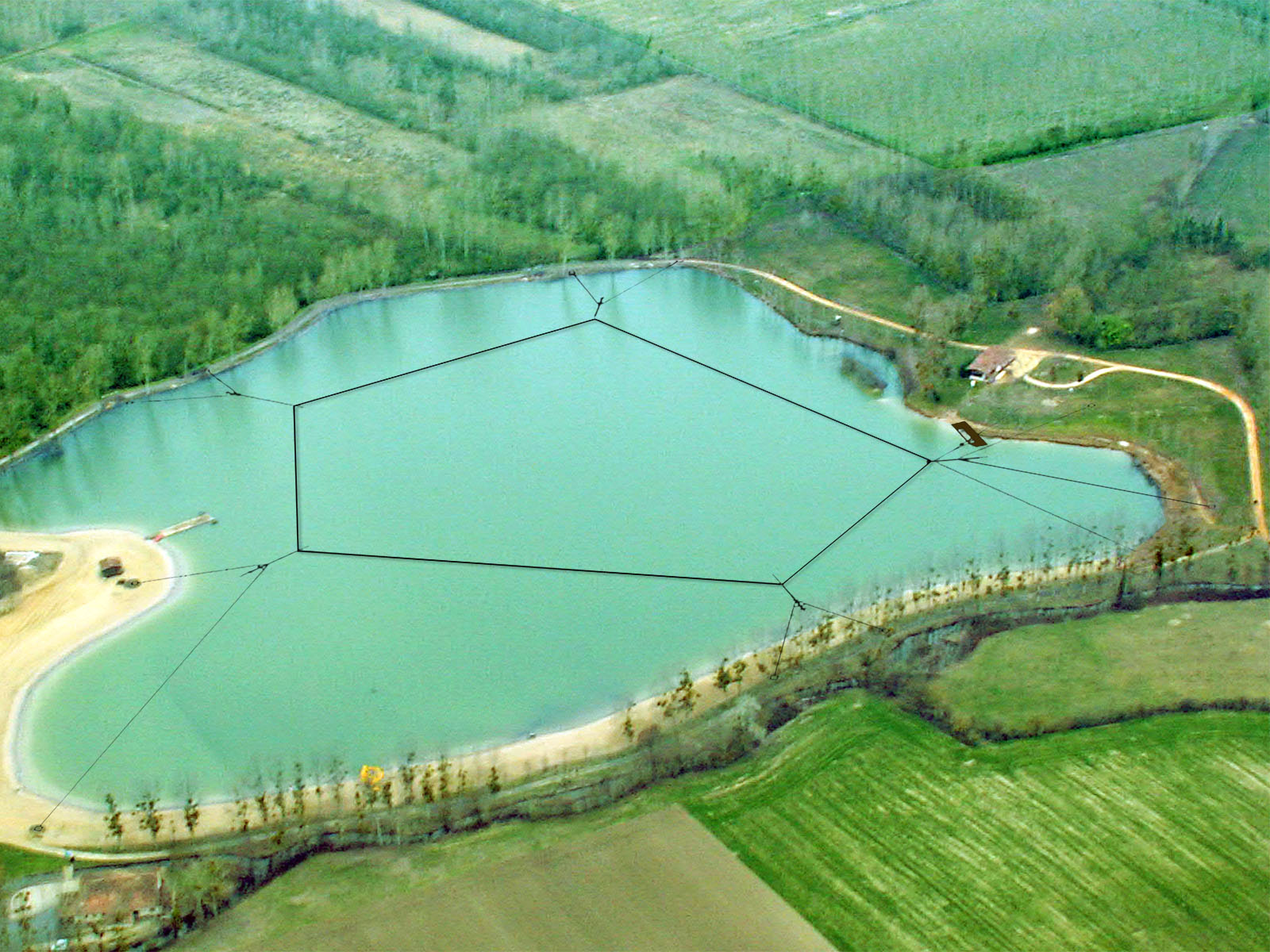 Schéma d'implantation du Téléski Nautique EXO Active Park de Moncontour (FR-86). Conception et réalisation en avril 2006 par RIXEN.